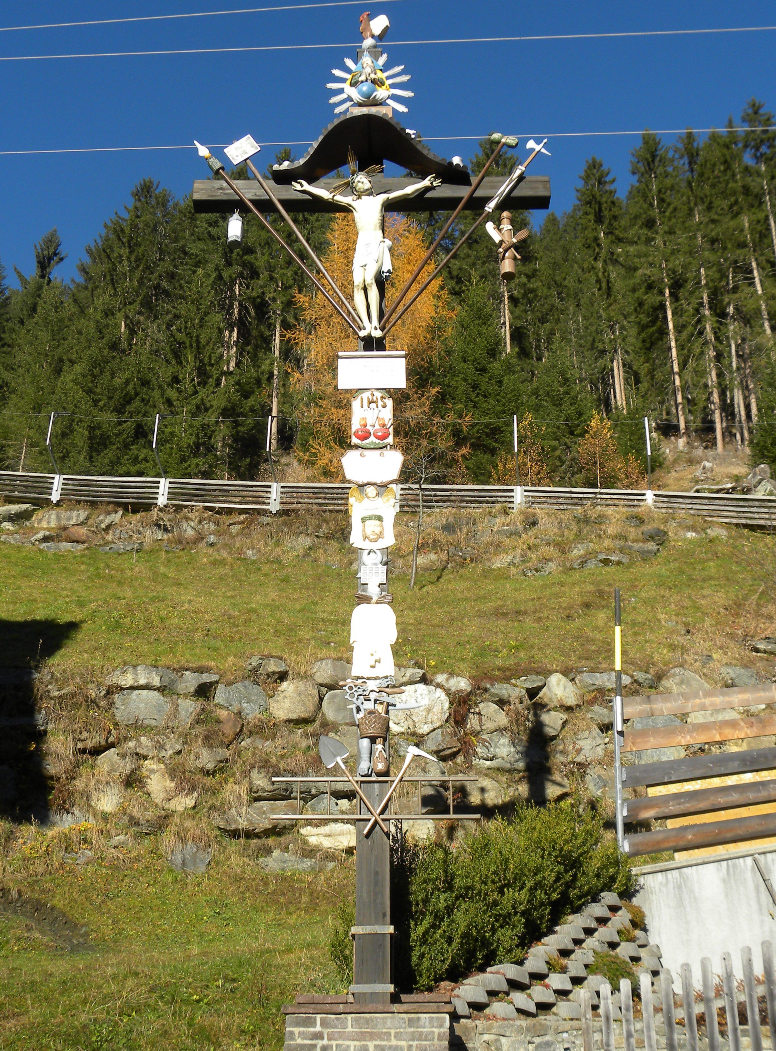 Das Tschatscha-Kreuz in Kappl im Paznauntal von Ignaz Falbesoner (1843). This media shows the remarkable cultural object in the Austrian state of Tyrol listed by the Tyrolean Art Cadastre with the ID 22761. (on tirisMaps, pdf, more images on Commons, Wikidata)